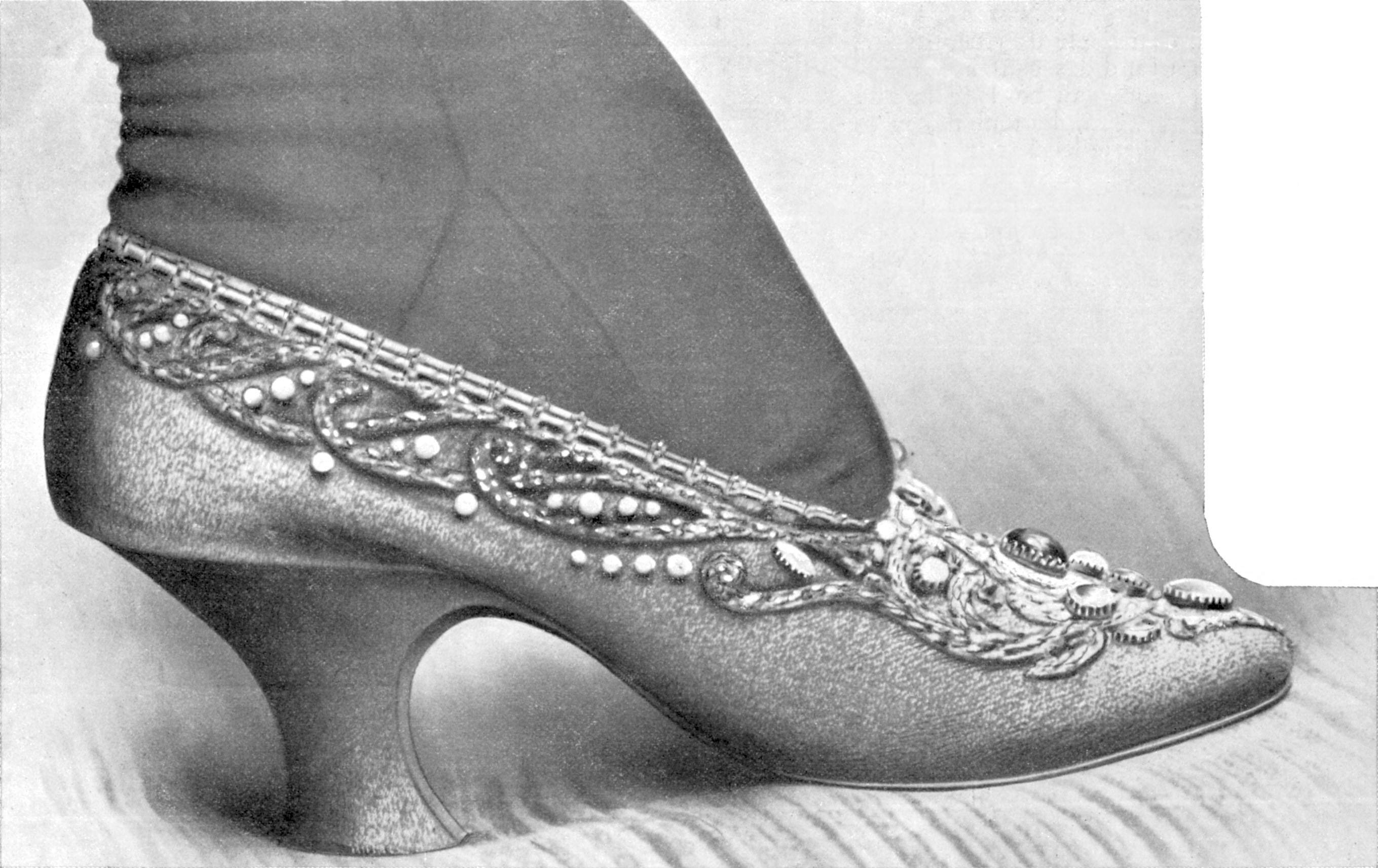 Le pied de Mme Perron grandeur nature. On peut voir d'après les dimensions de cette photographie que l'escarpin de Mme Perron eut fait reculer Cendrillon elle-même.